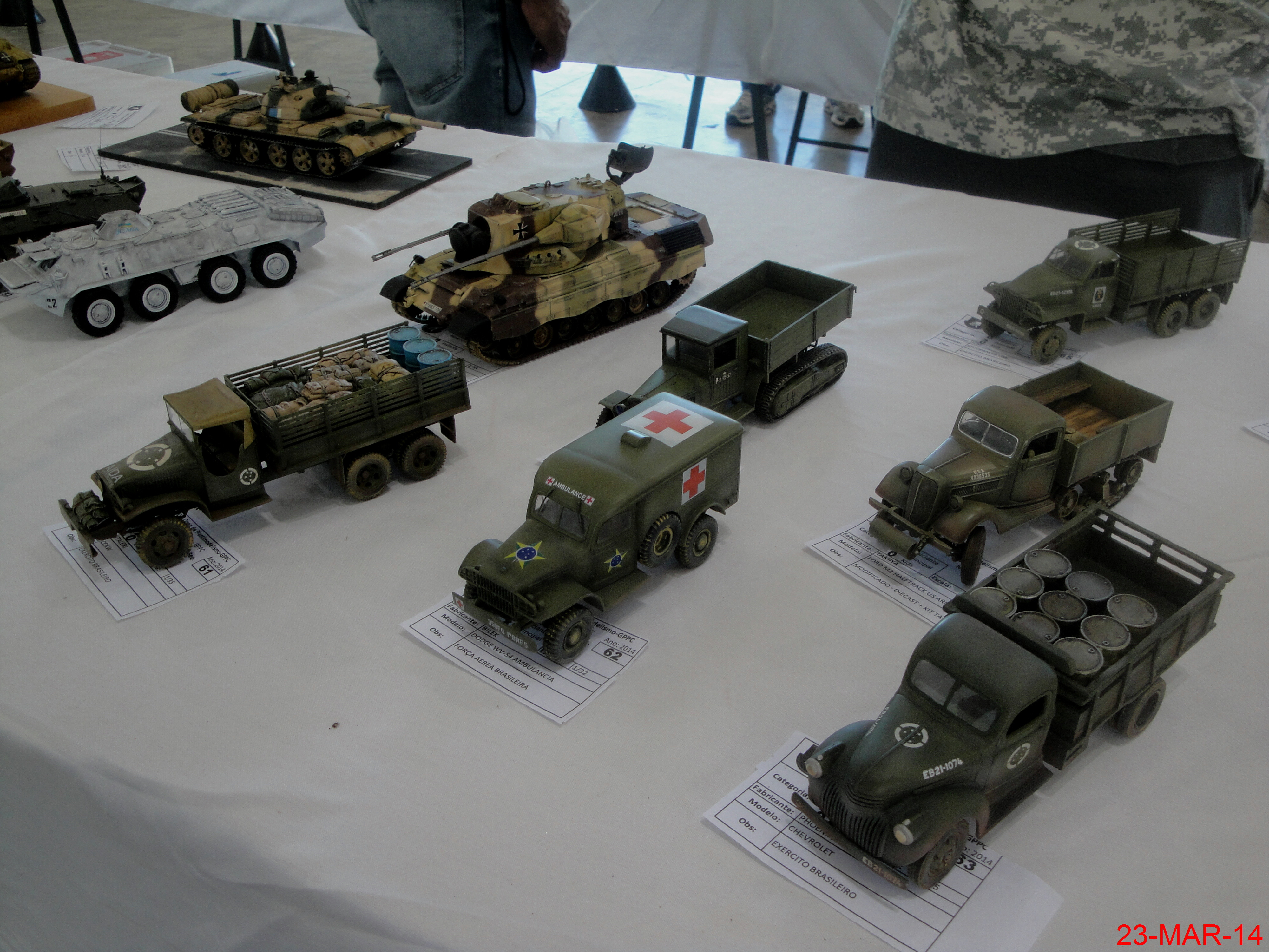 XVII Open de Plastimodelismo de Catanduva realizado no Espaço de Exposições da Estação Cultura em Catanduva.